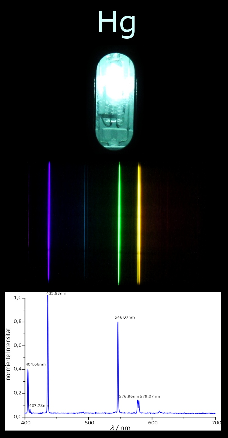 Hg-Niederdrucklampe mit Spektrum.